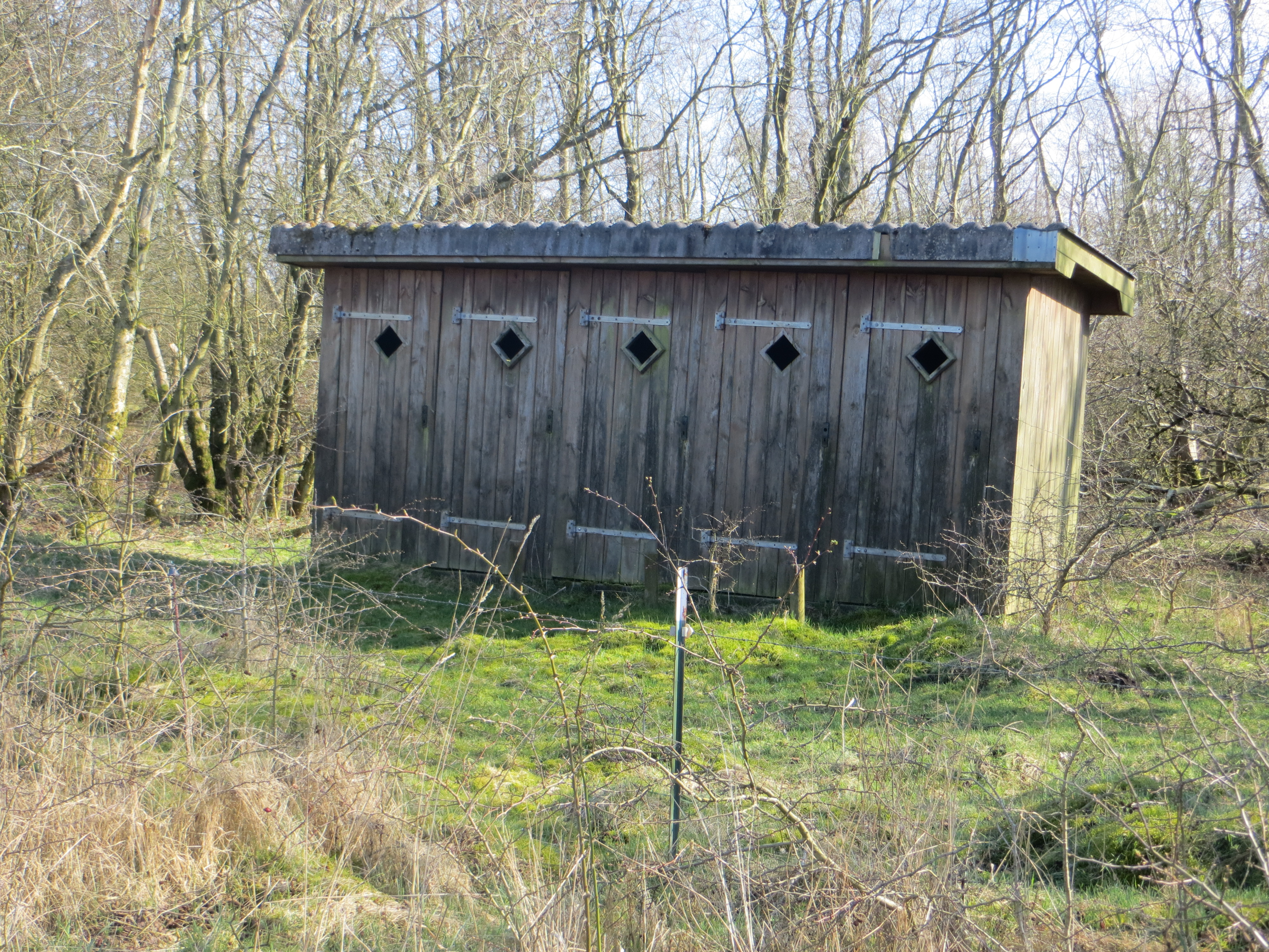 Reihenplumpsklo der Bundeswehr auf dem Stiftungsland Schäferhaus Nord, ehem. TrÜbPl Jägerslust